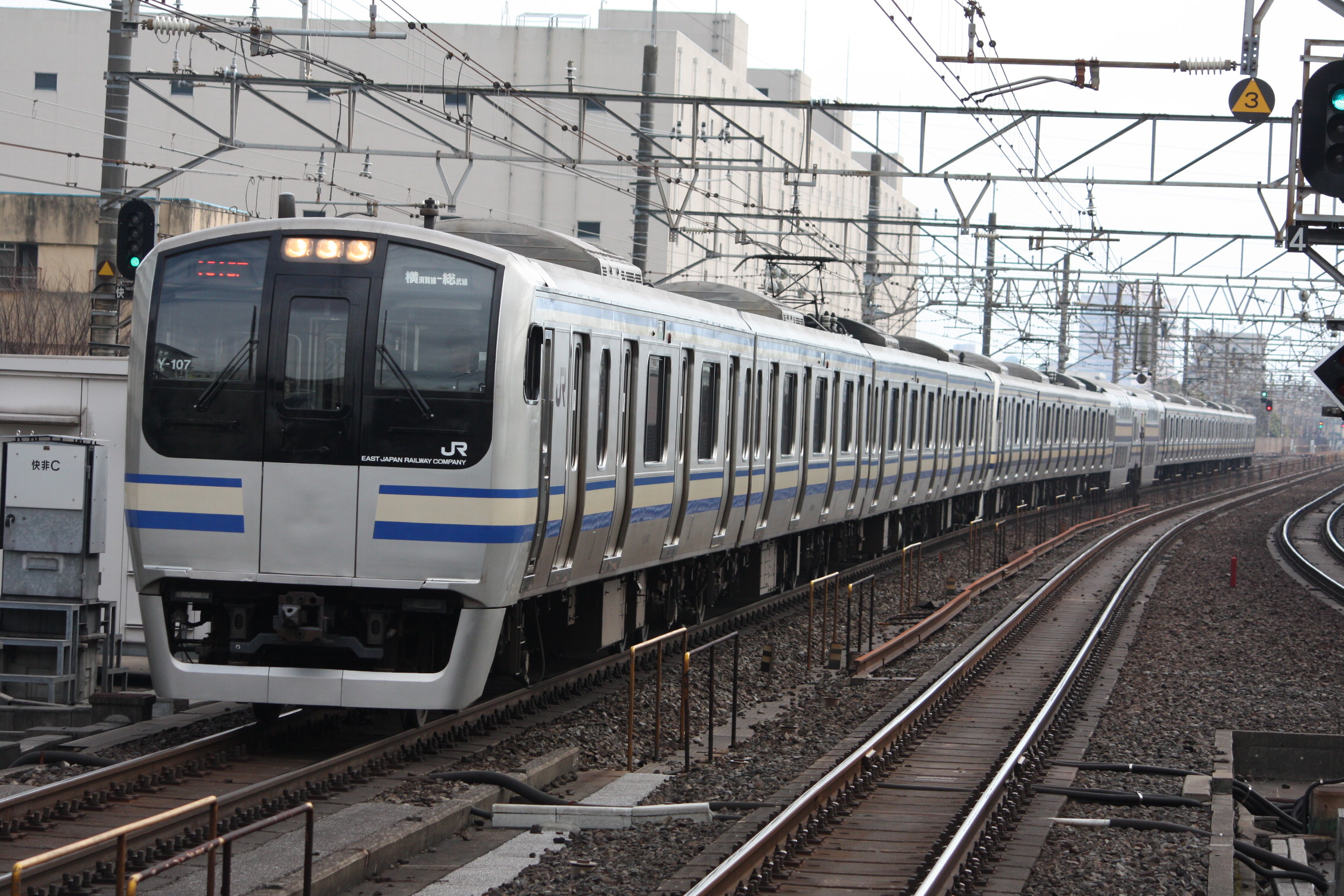 E217系更新車 稲毛にて